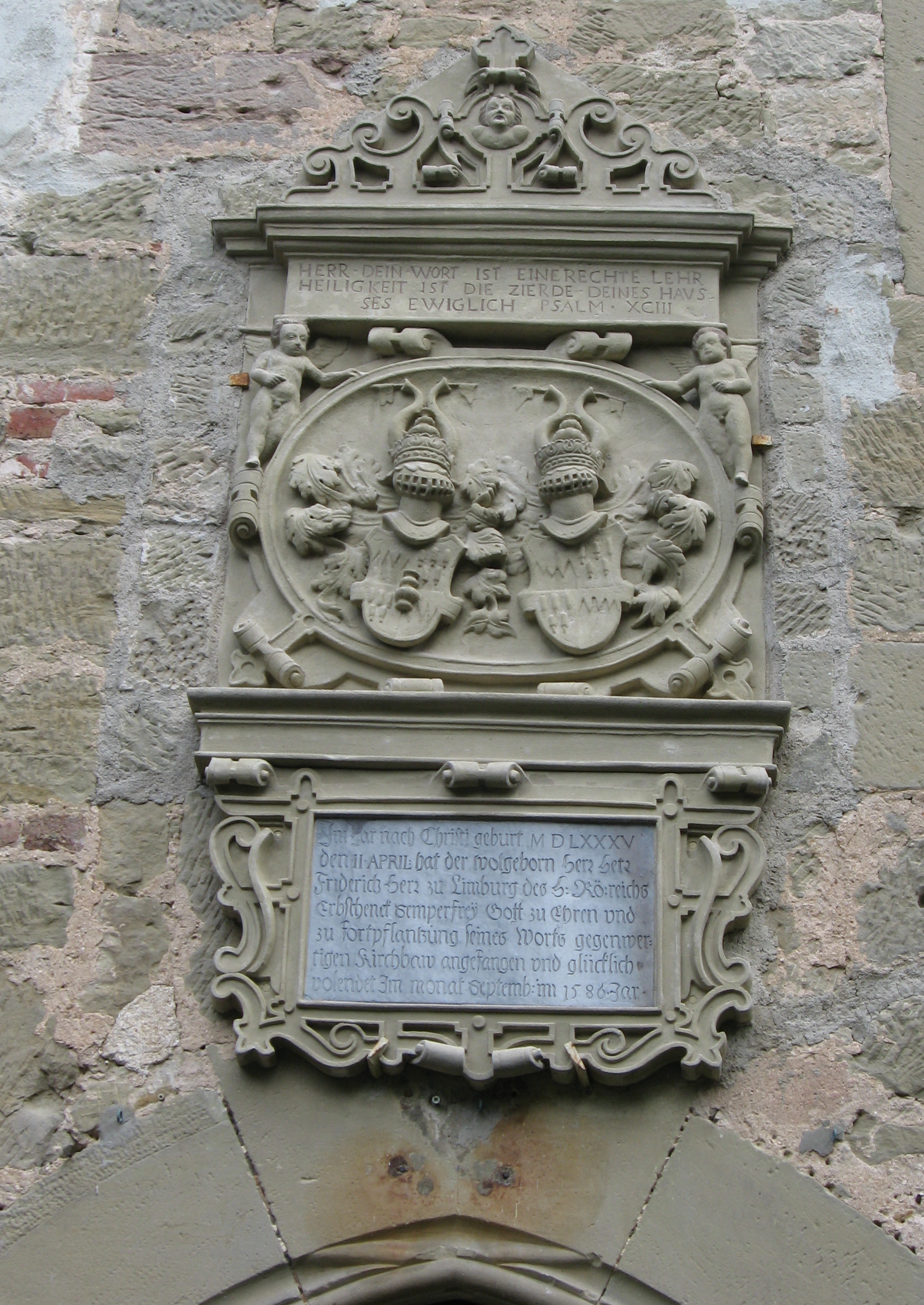 Stiftertafel über dem Eingang an der Nordwestseite der Evangelische Pfarrkirche Obersontheim.